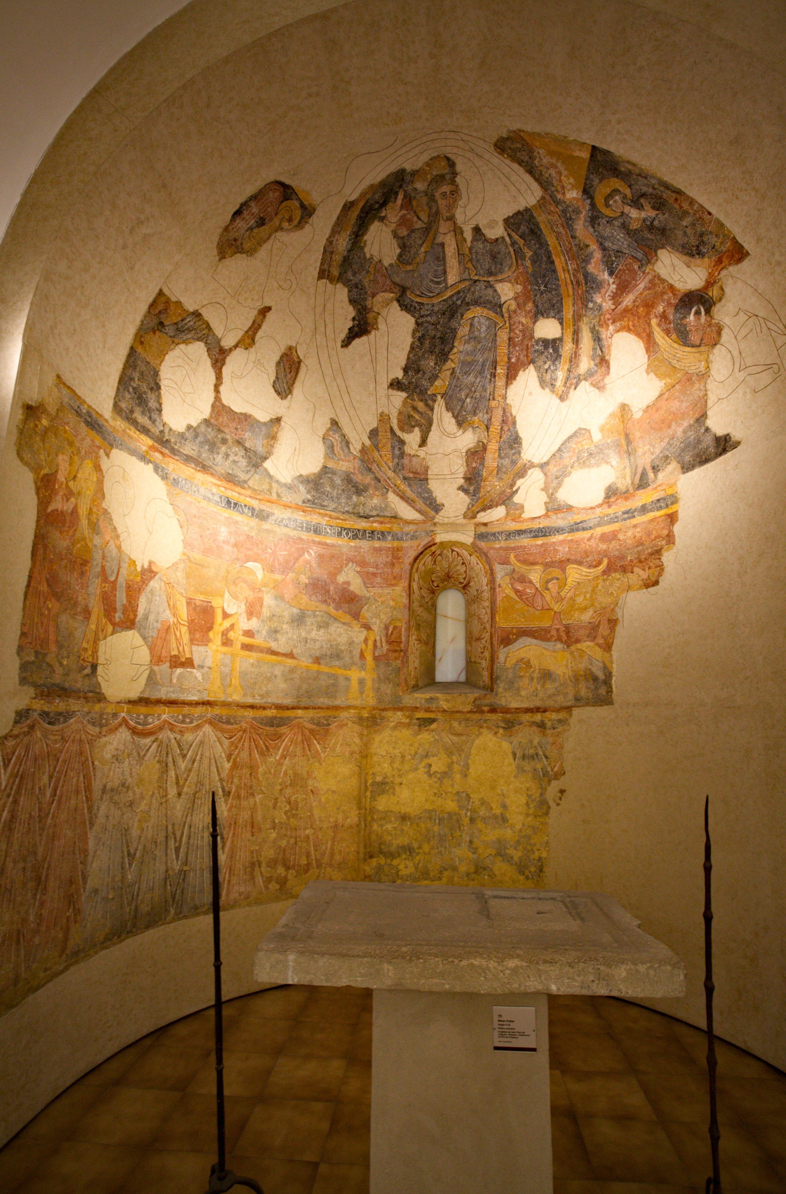 Pintures murals de l'església de Sant Andreu de Pedrinyà (La Pera, l'Empordà, Catalunya). Actualment estan al Museu d'Art de Girona.